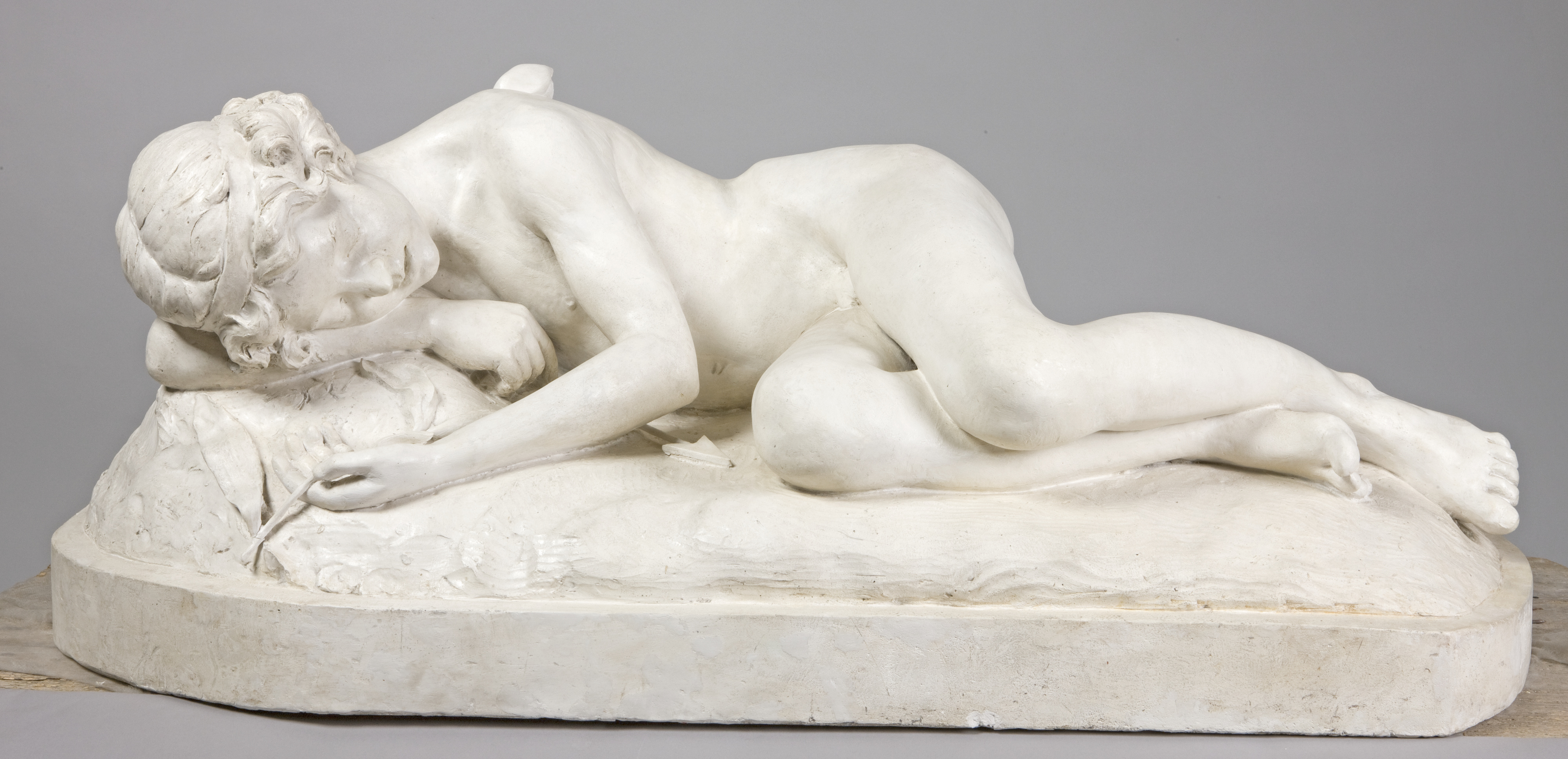 Rzeźba "Śpiący Amor" Natalii Andriolli ze Zbiorów Cyfrowych Muzeum Narodowego w Krakowie, MNK II-rz-1, fot. Paweł Czernicki